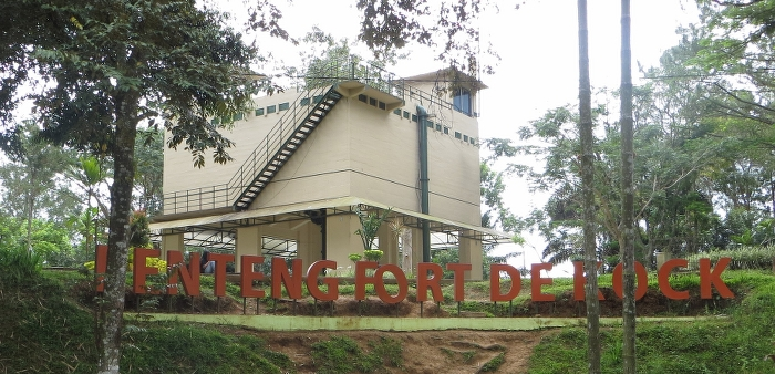 Benteng Fort de Kock